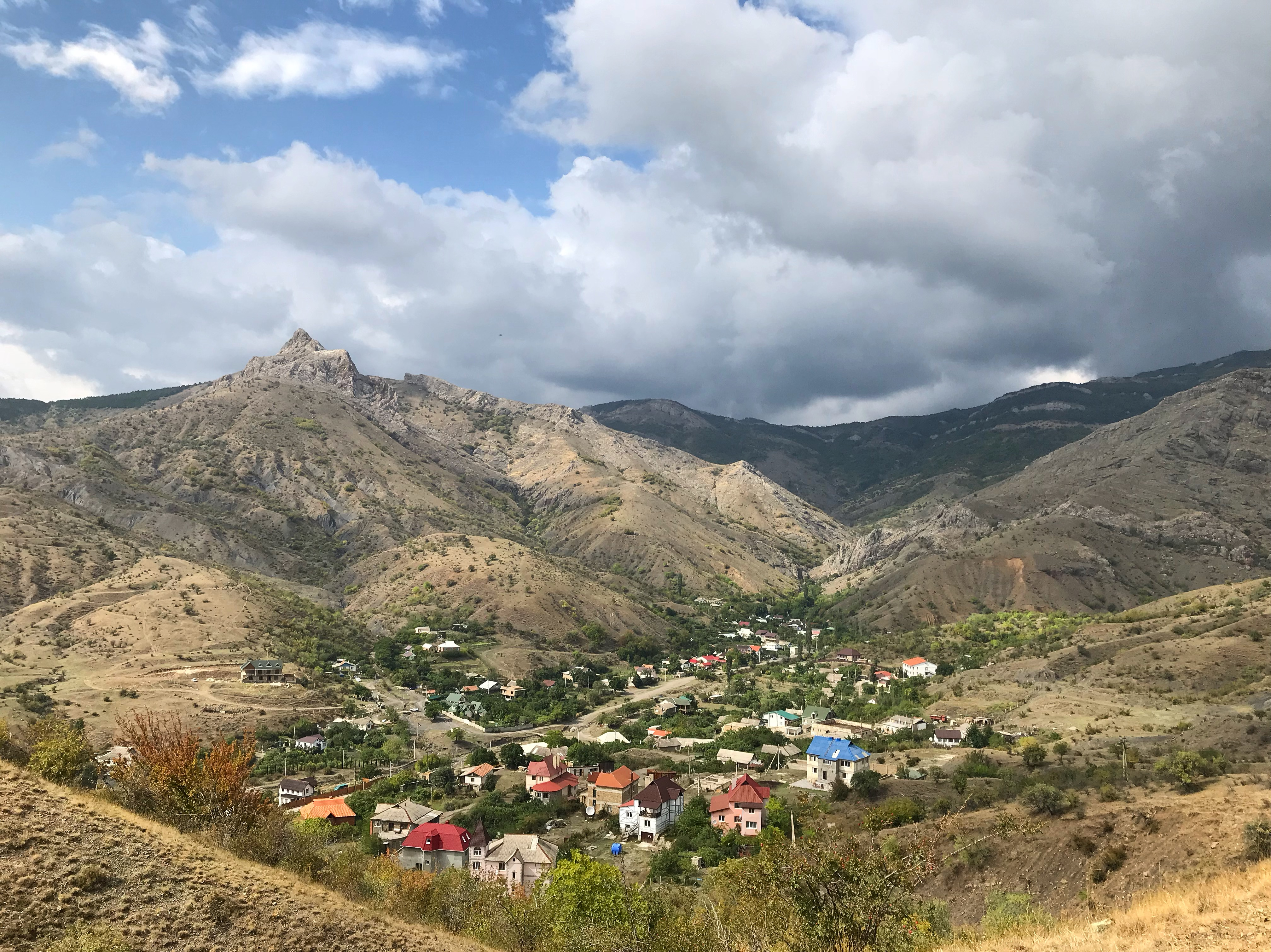 Населенный пункт Зеленогорье в Крыму